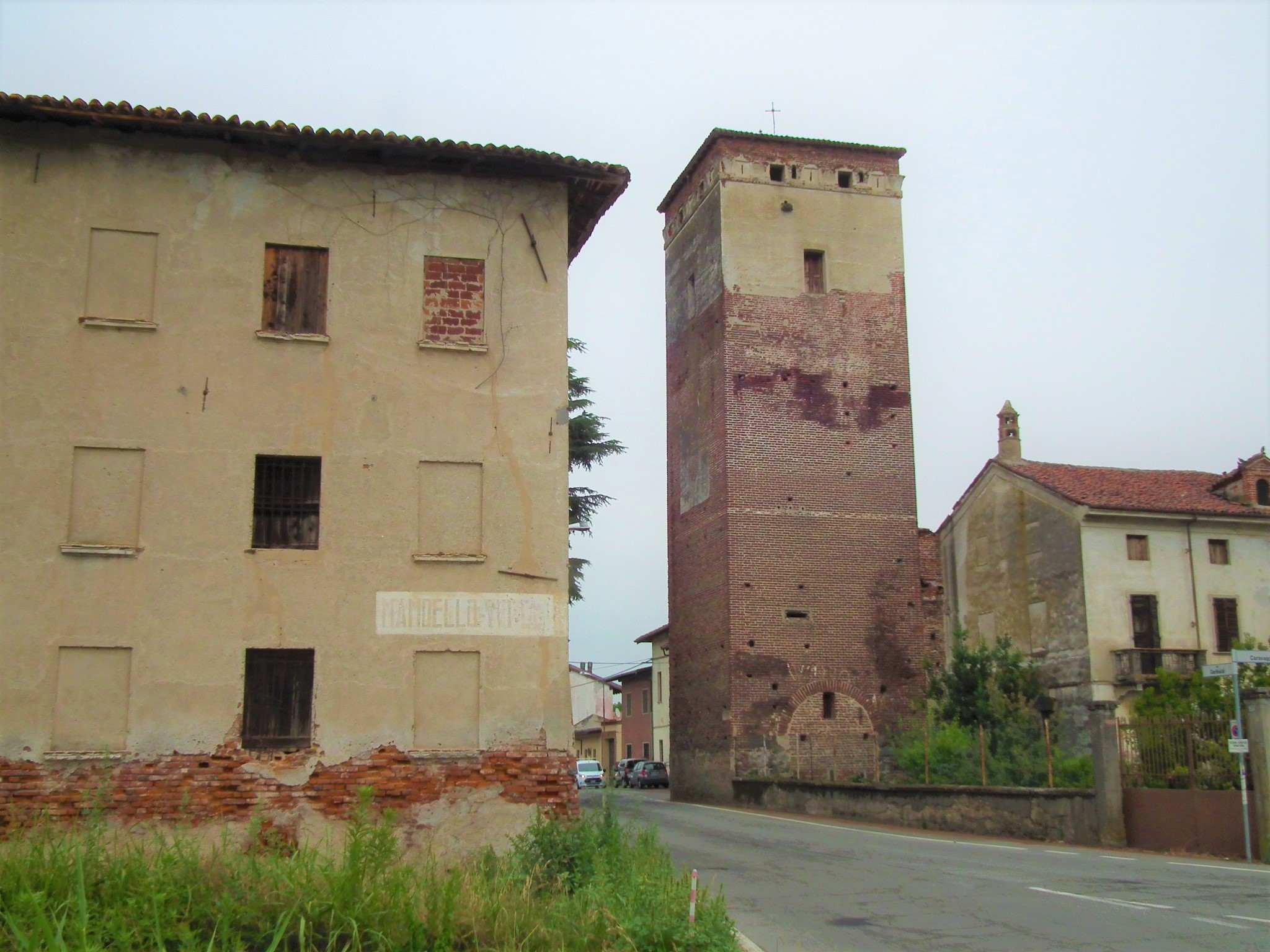 Questa immagine ritrae l'entrata principale di Mandello Vitta dove si può ammirare la torre, simbolo del paese.